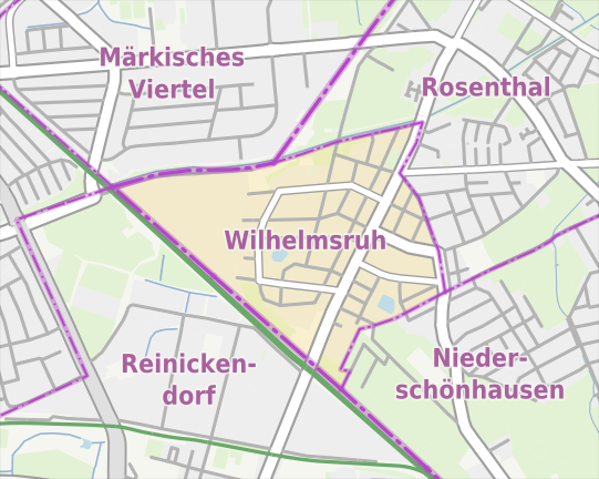 Übersichtskarte der Straßen und Ortslagen in Berlin-Wilhelmsruh